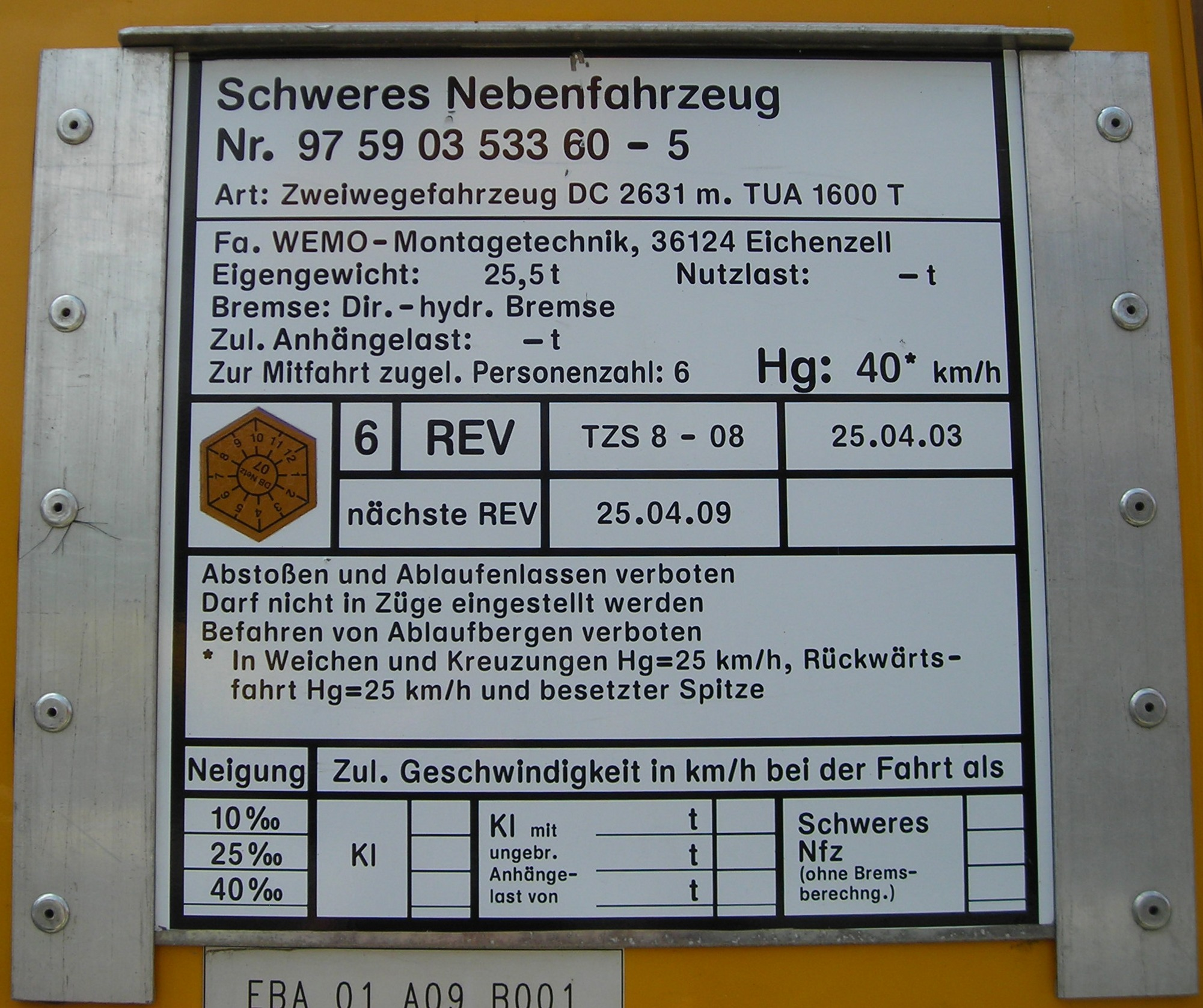 Zweiwegefahrzeug Wemo DC2631 (Front) zur Inspektion von Bahnanlagen auf Basis eines Mercedes Benz Actros 2031 (Schweres Nebenfahrzeug). Hersteller: Wemo, Eichenzell (Rhön), Exponat auf der Internationalen Fachmesse für Baumaschinen, Baustoffmaschinen, Bergbaumaschinen, Baufahrzeuge und Baugeräte (bauma) in München 2007